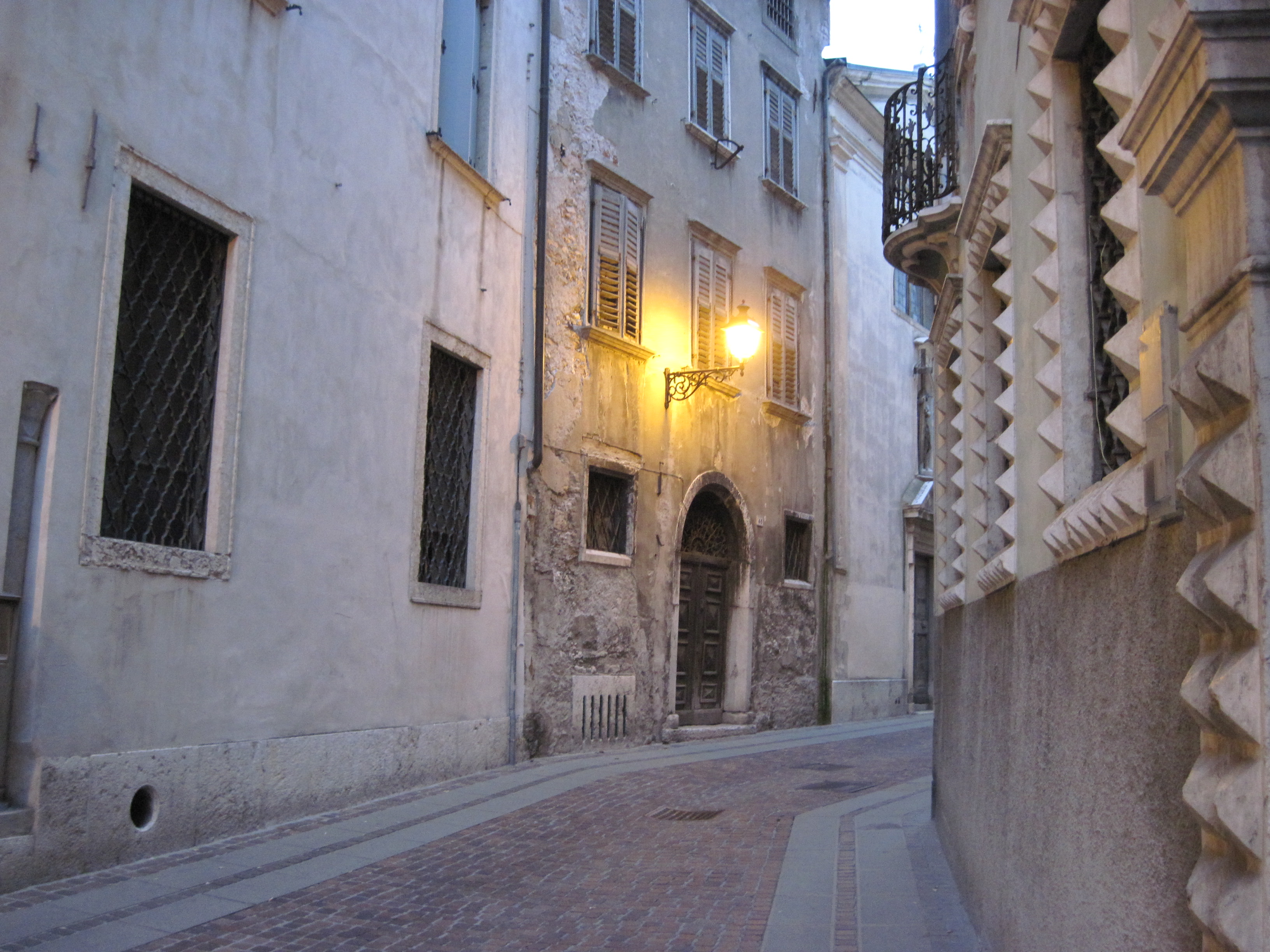 Sede dell'Accademia degli Agiati dal 1766 al 1795. Via della Terra, Rovereto. Novembre 2013